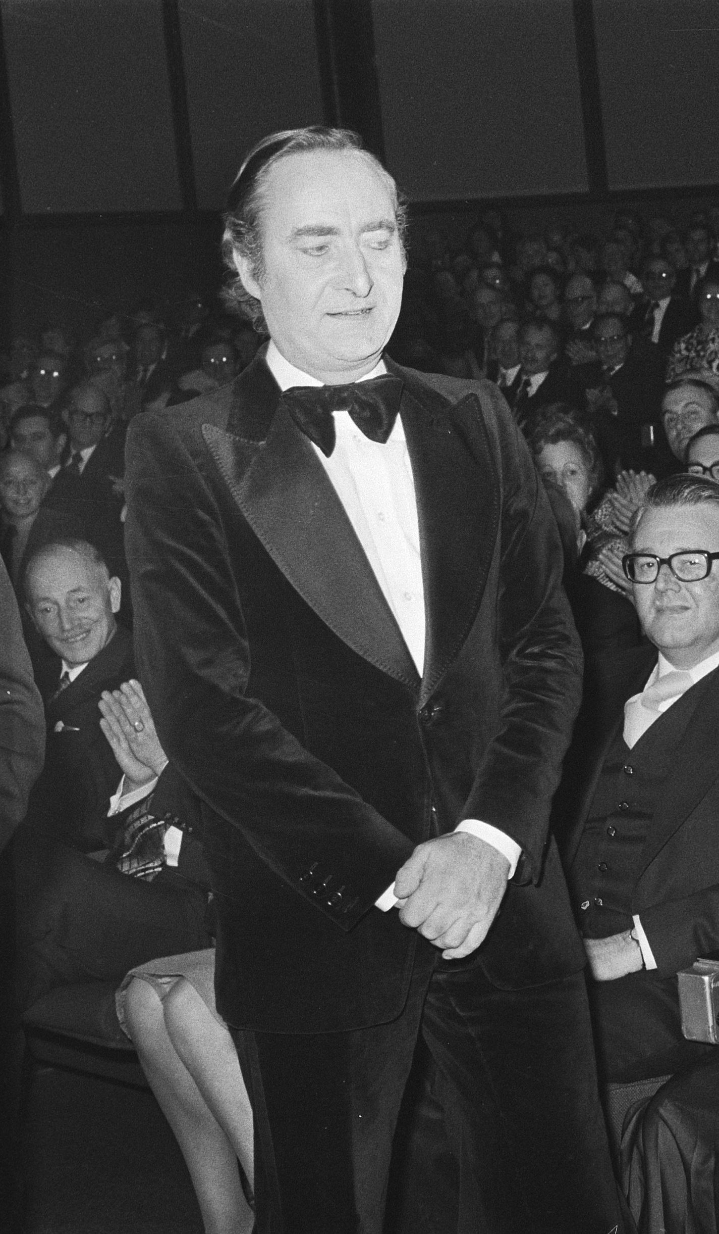 Koningin bij jubileumviering van 75-jarig bestaan Drukkersorganisatie in RAI-congrescentrum; Koningin met Fons Jansen die een korte voordracht hield /